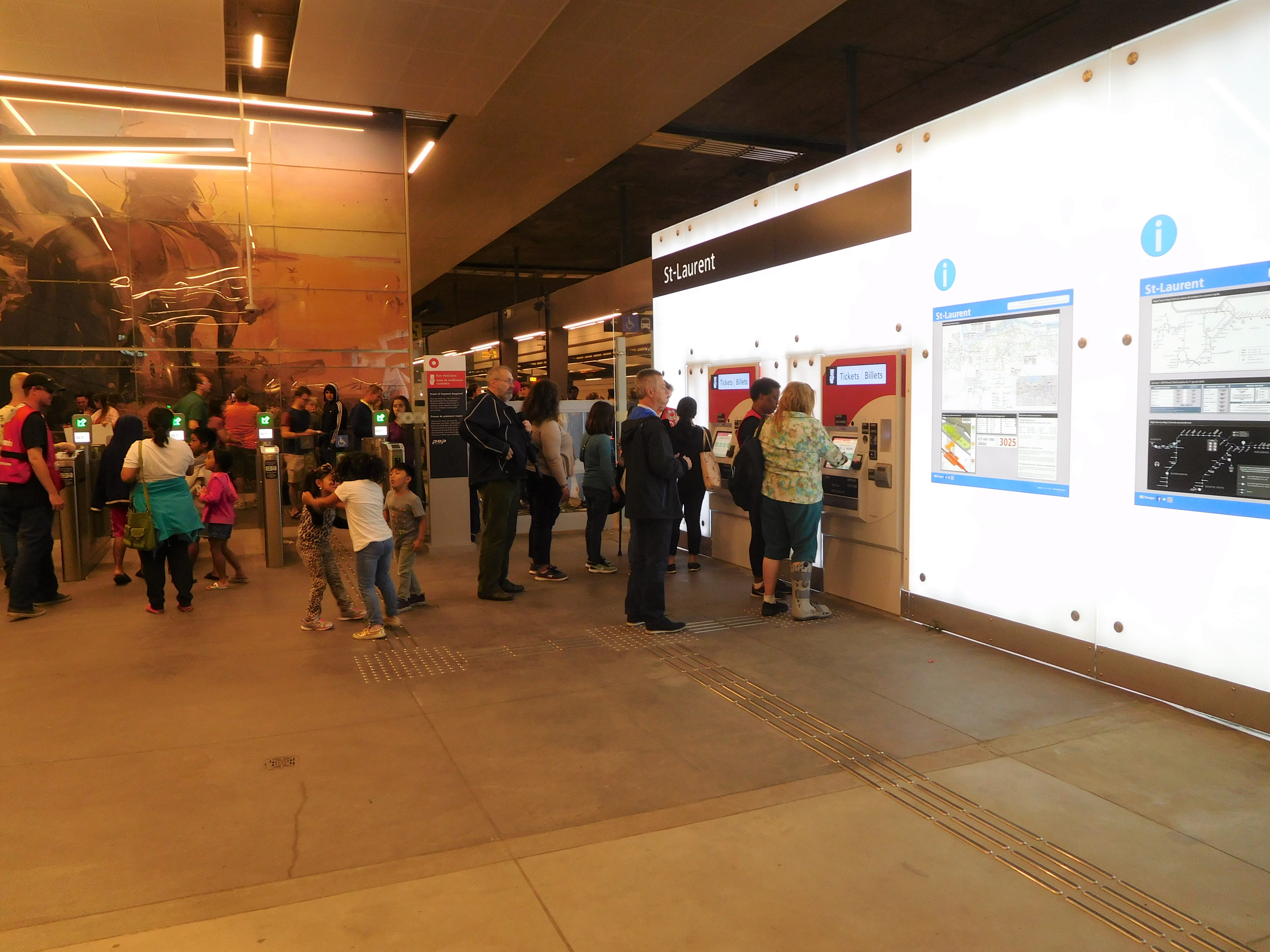 Station St-Laurent de la ligne de la Confédération à Ottawa